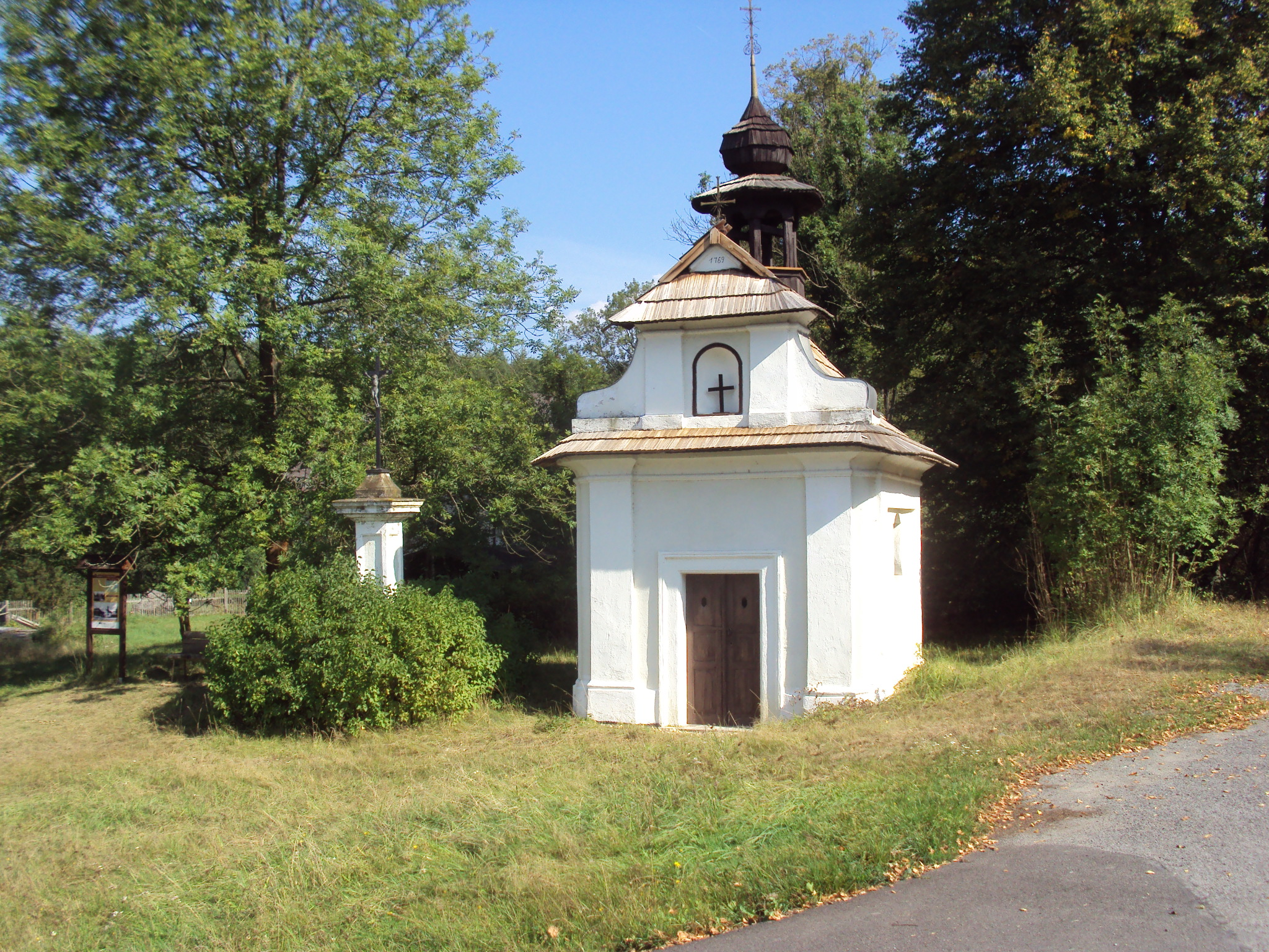 Kaple sv. Vavřince v Břehyni, kulturní památka 2884